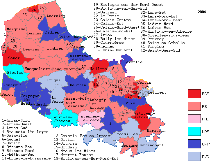 Cantons du 62 en 2004.